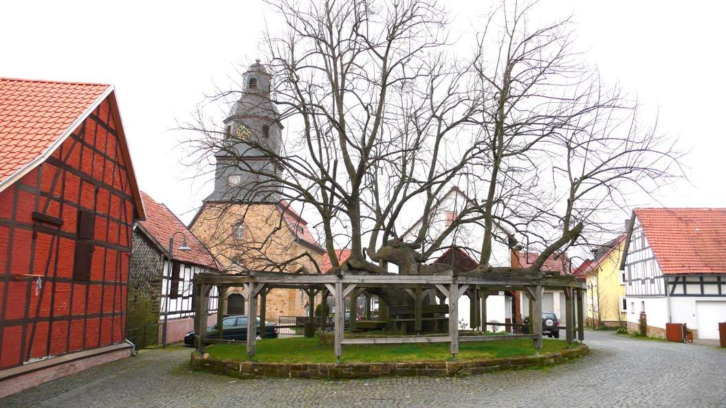 Linde in Sebbeterode im unbelaubten Zustand